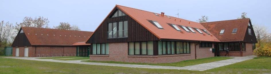 Landesleistungszentrum Rudern und Kanu an der Regattastrecke Hamburg-Allermöhe